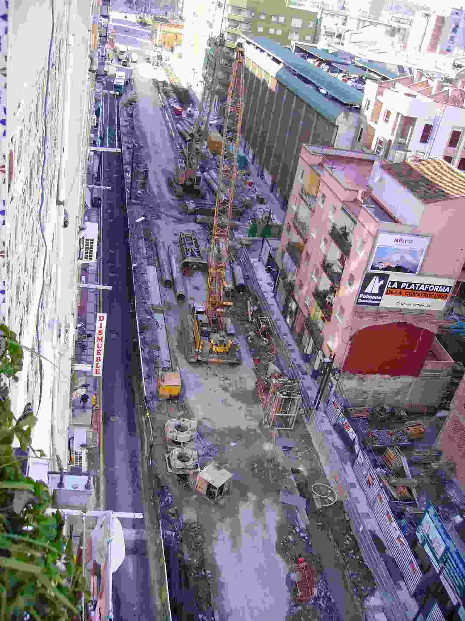 Obras del metro en Málaga Linea 2, mirando hacia la calle goya. Es la calle Héroe de sostoa